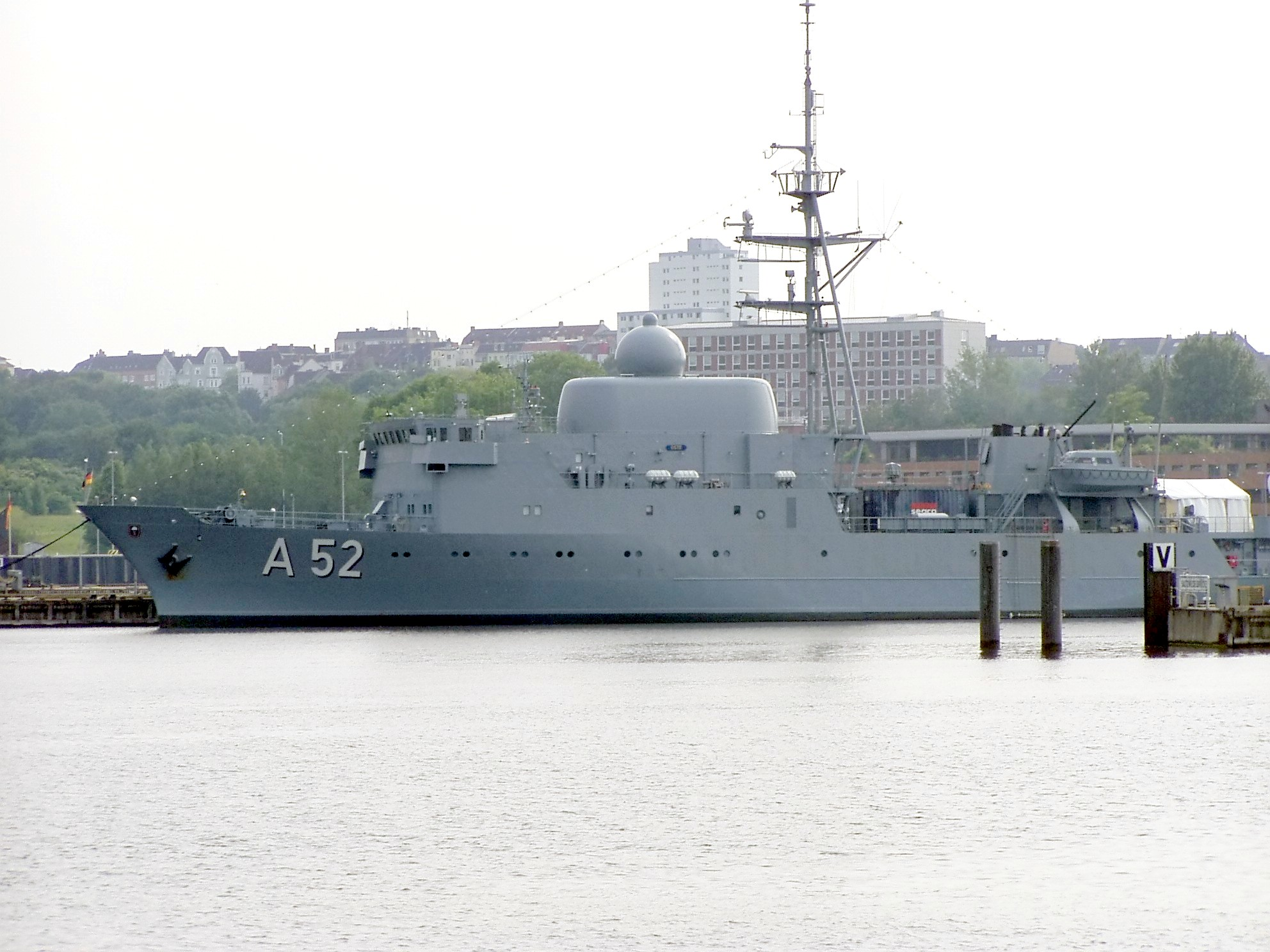 Flottendienstboot A52 "Oste"